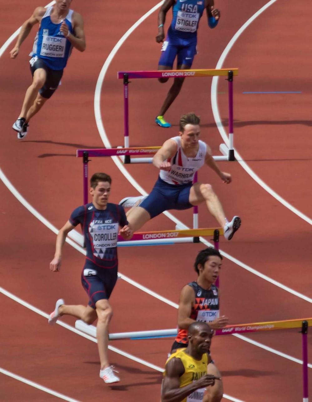 d2_9 400H warholm